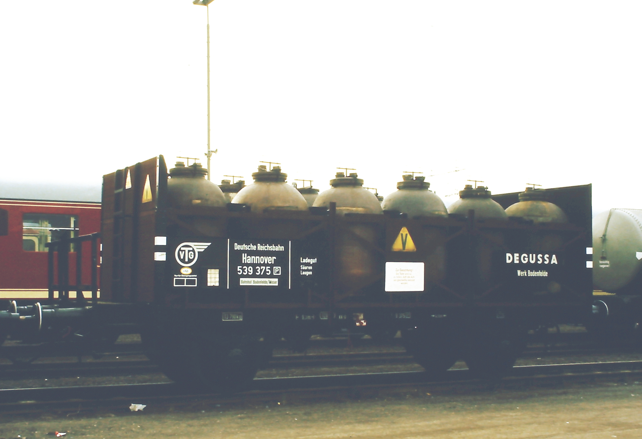 Z53 (DEGUSSA) Topfwagen, ausgestellt auf der Fahrzeugschau 150 Jahre deutsche Eisenbahn in Bochum-Dahlhausen